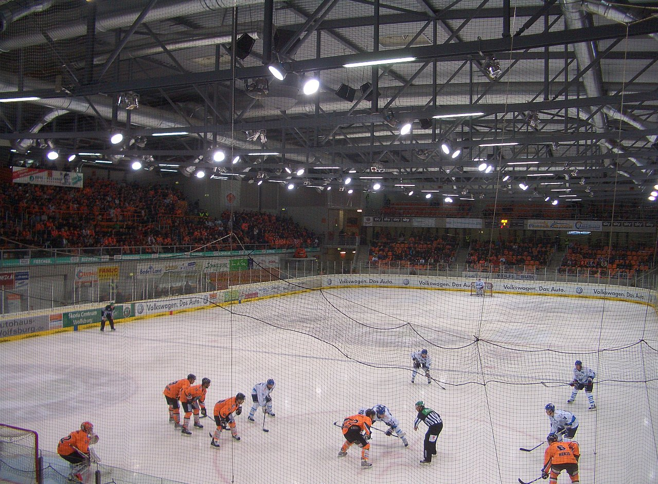 Inside of "Eisarena Wolfsburg" (EHC Wofsburg vs. Adler Mannheim 27.11.09)